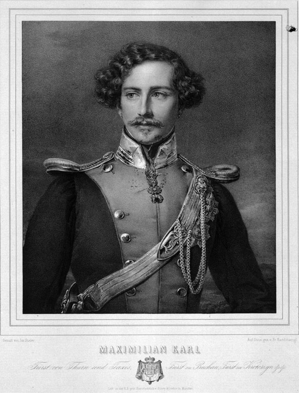 Maximilian Karl von Thurn und Taxis. Ergens uit de 19e eeuw.